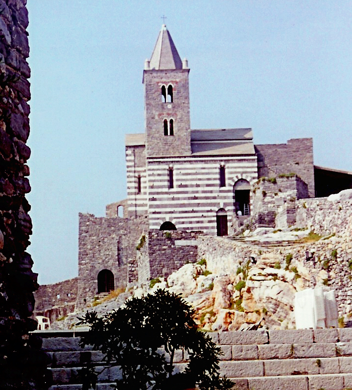 Porto Venere, Chiesa di San Pietro